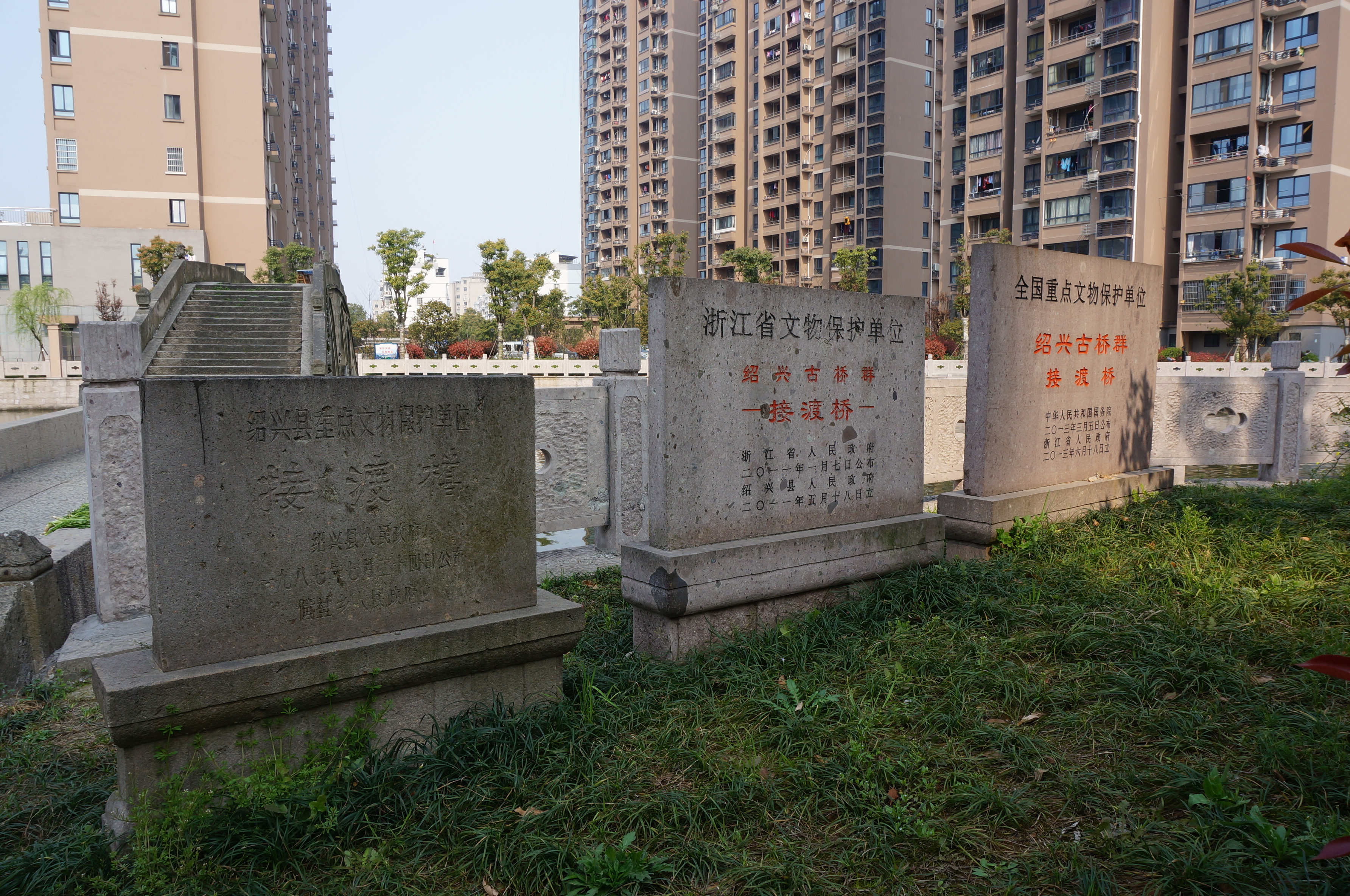 接渡桥，文保碑。